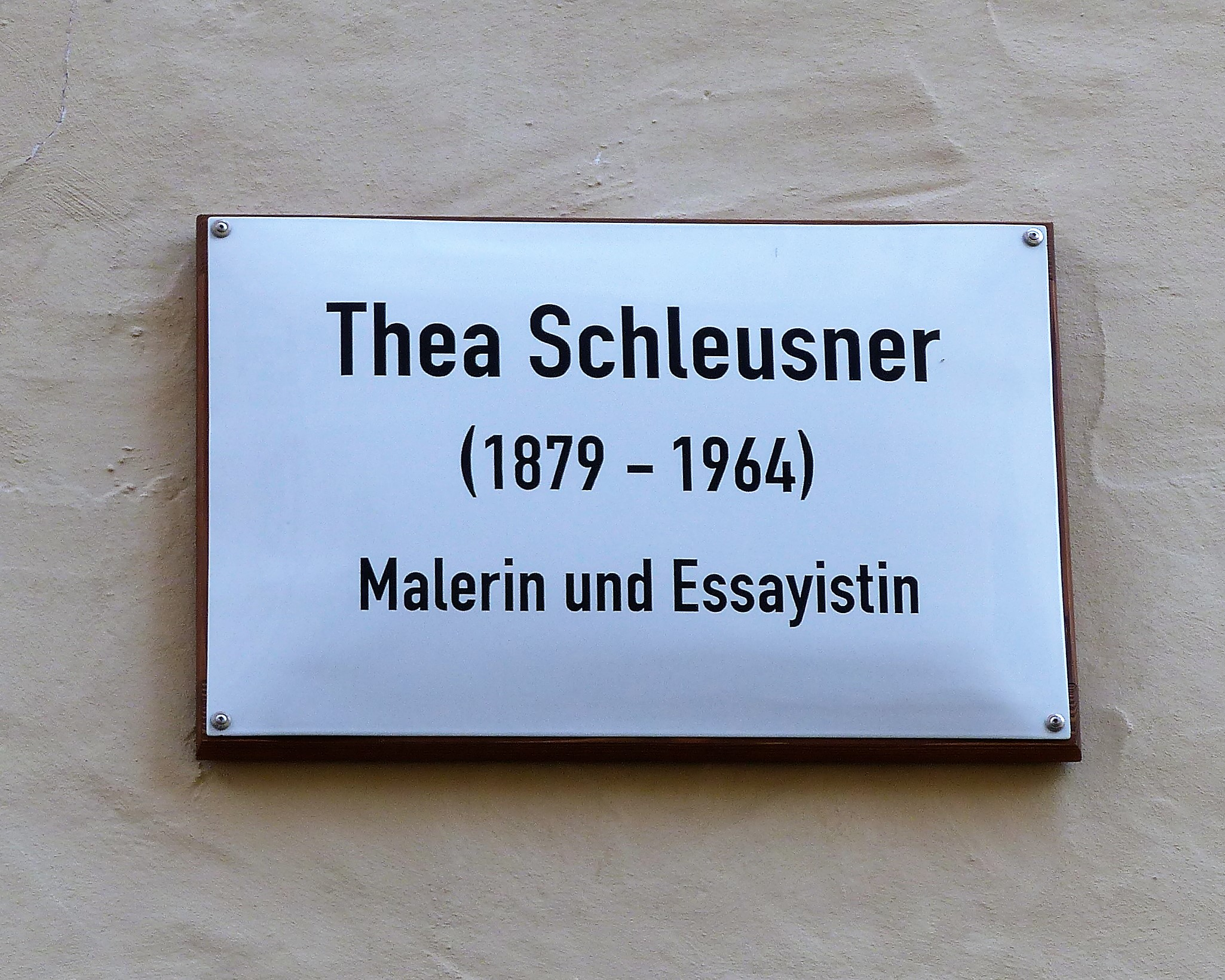 Gedenktafel am ehemaligen Wohnhaus von Thea Schleusner in Wittenberg, Kirchplatz 10. Dort verbrachte sie ihre Kindheit und Jugend. Auf Anregung des Publizisten Mathias Tietke veranlasste und finanzierte der Wittenberger Rotary Club diese Gedenktafel, die im Sommer 2017 angebracht wurde.